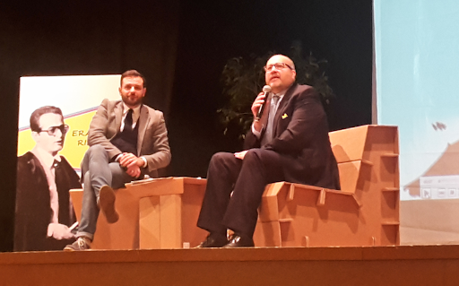 Rino Giacalone ritira il premio Marcello Torre 2016 per l'impegno civile.